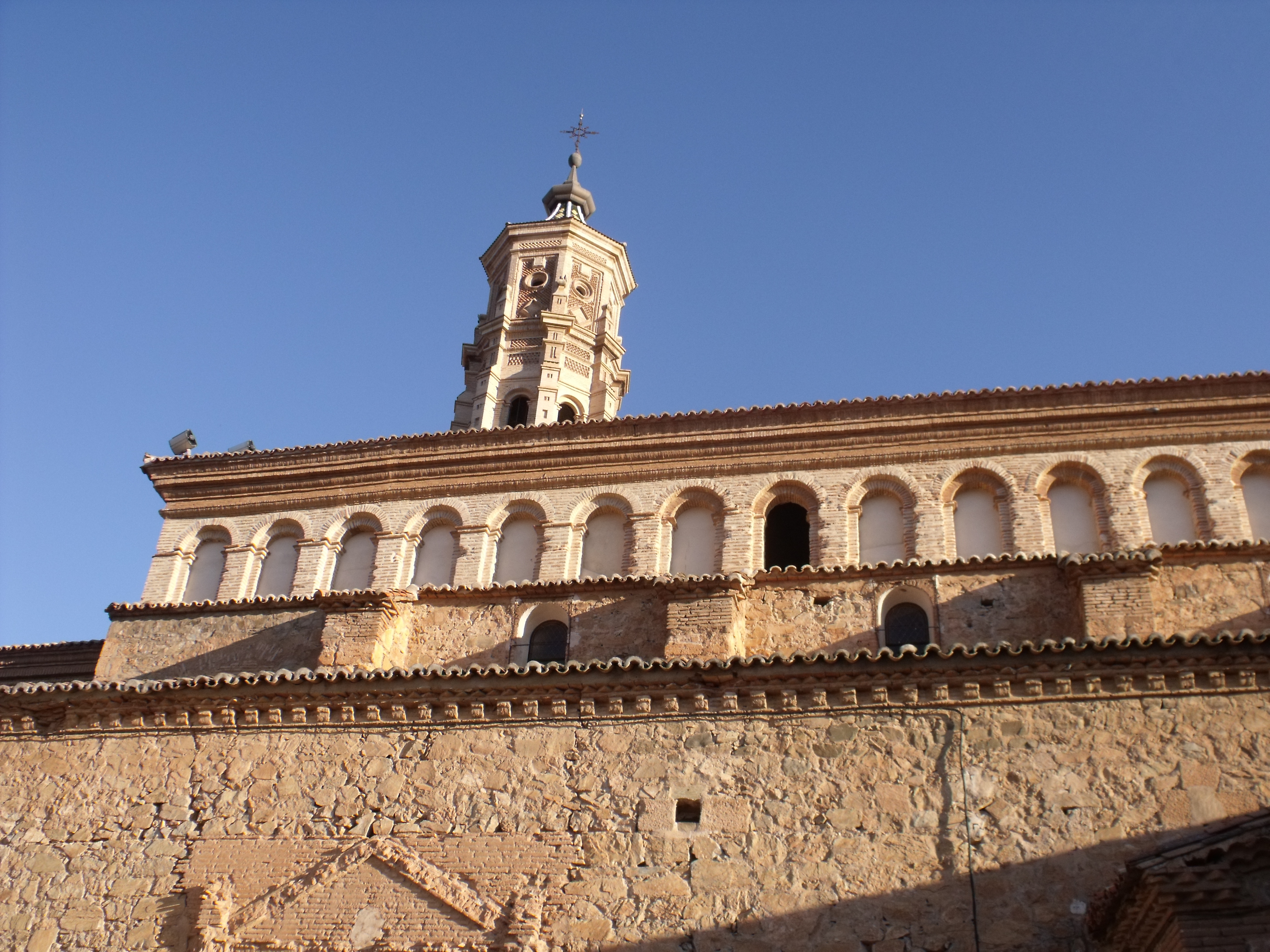 San Martín del Río